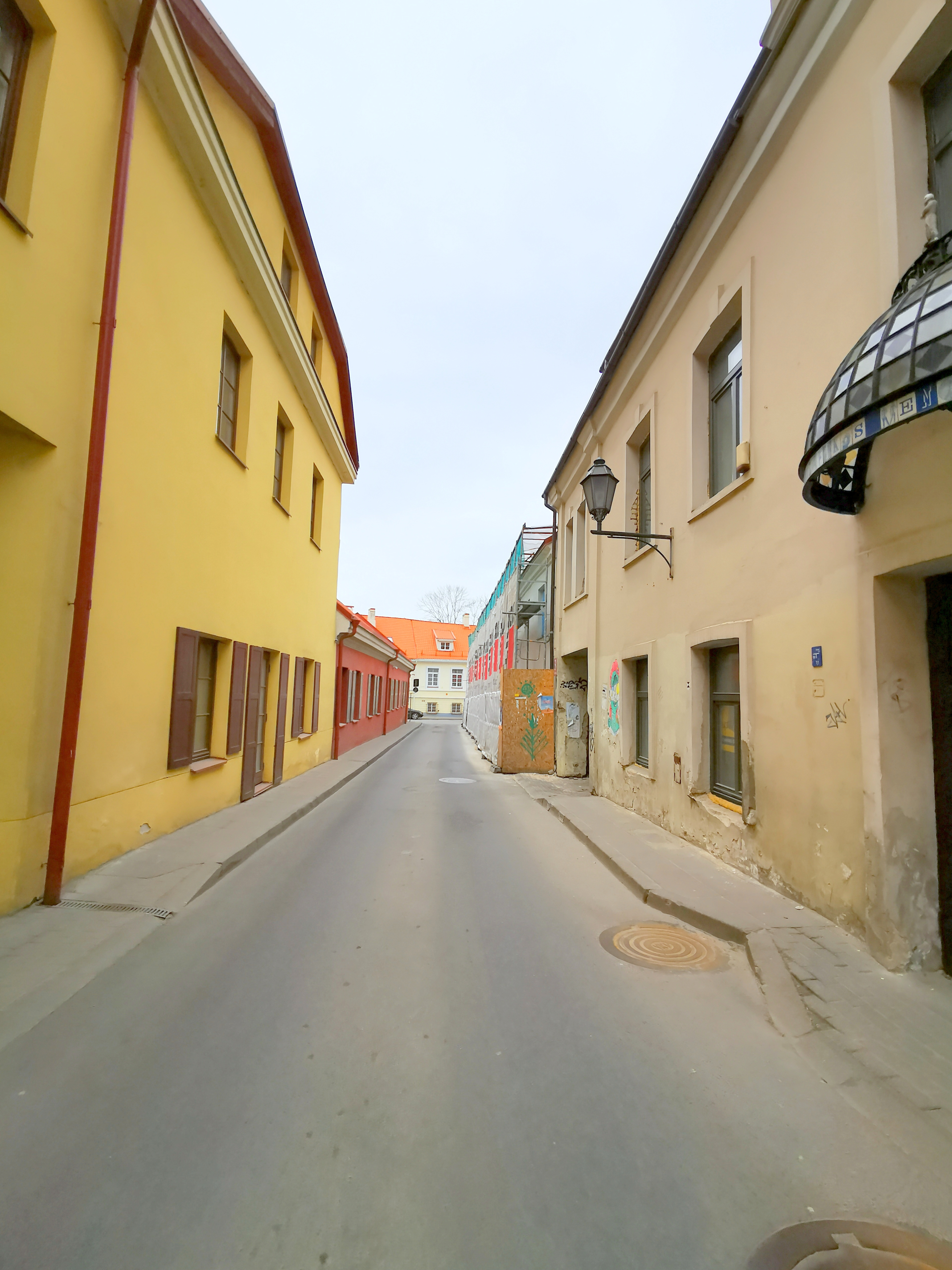 Latako gatvė